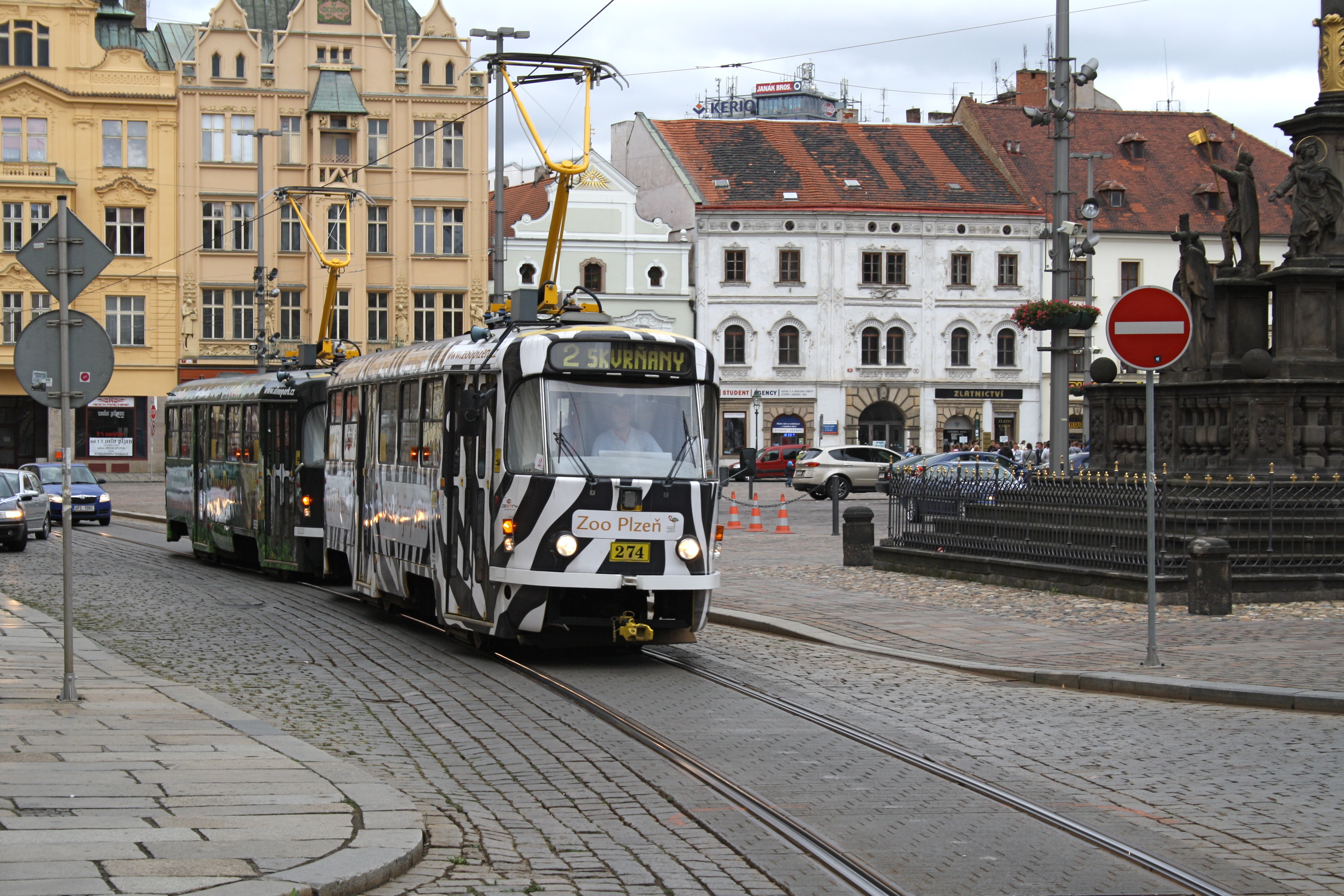 Tram Pilsen Nám. Republiky